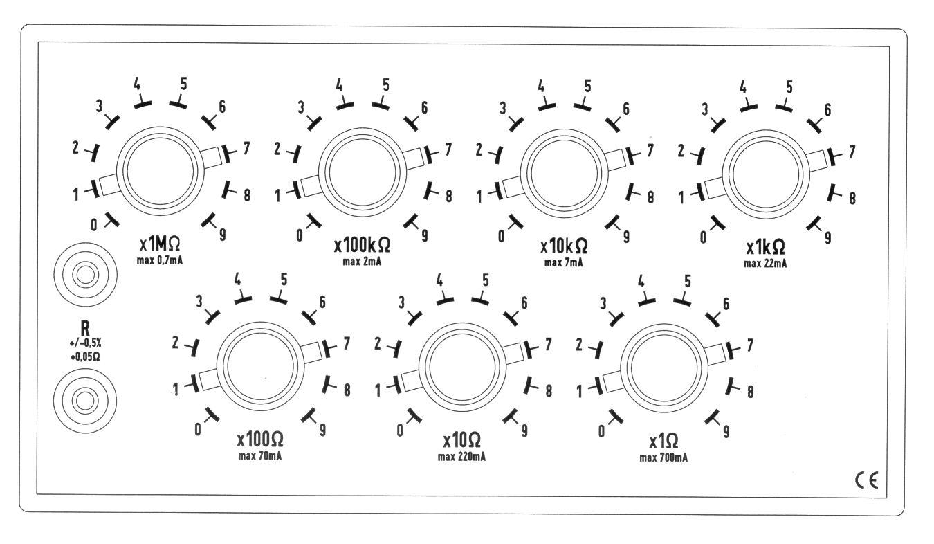 Dekád-ellenállás ellenállásértékek gyors, leolvasható, pontos beállítására